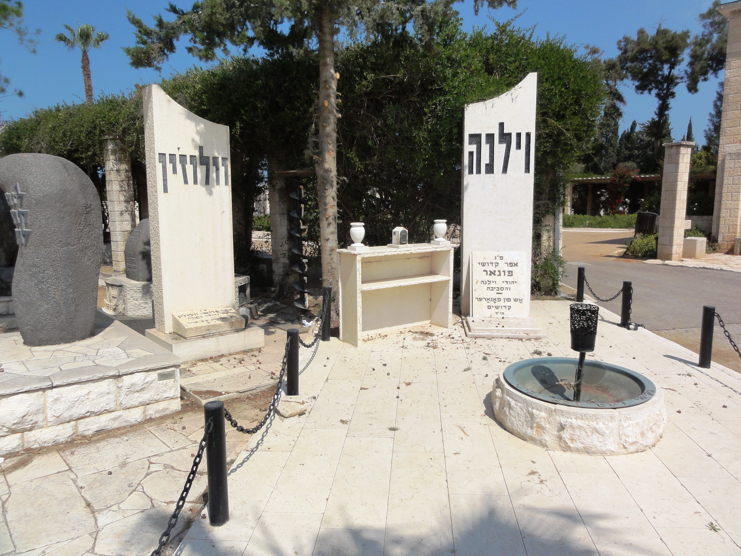 אנדרטות לזכר קהילות וילנה ווולוז'ין